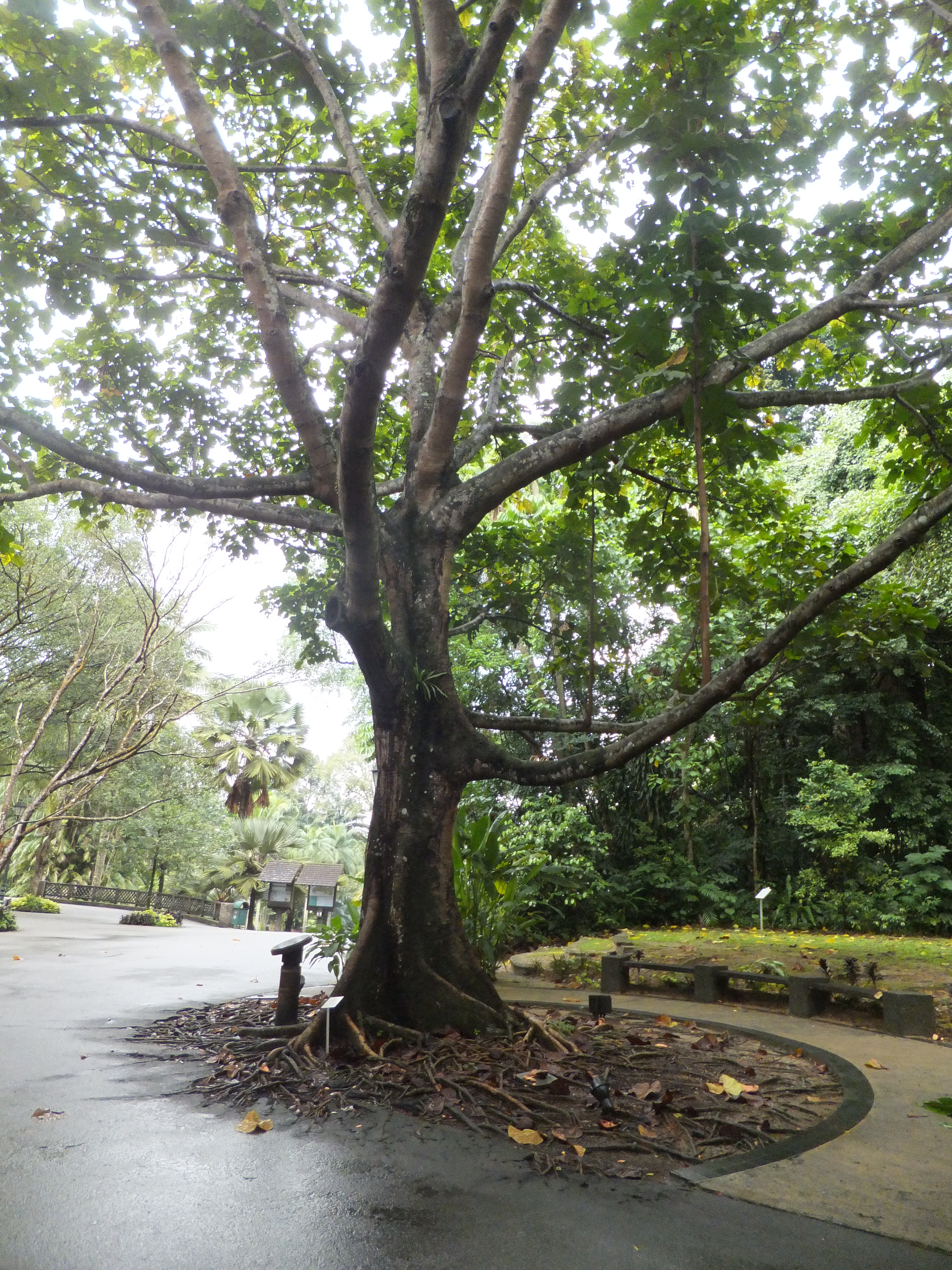 新加坡植物園為紀念南非總統納爾遜・曼德拉於1997年3月5日來訪，所植之巨可樂樹（Giant Cola）。